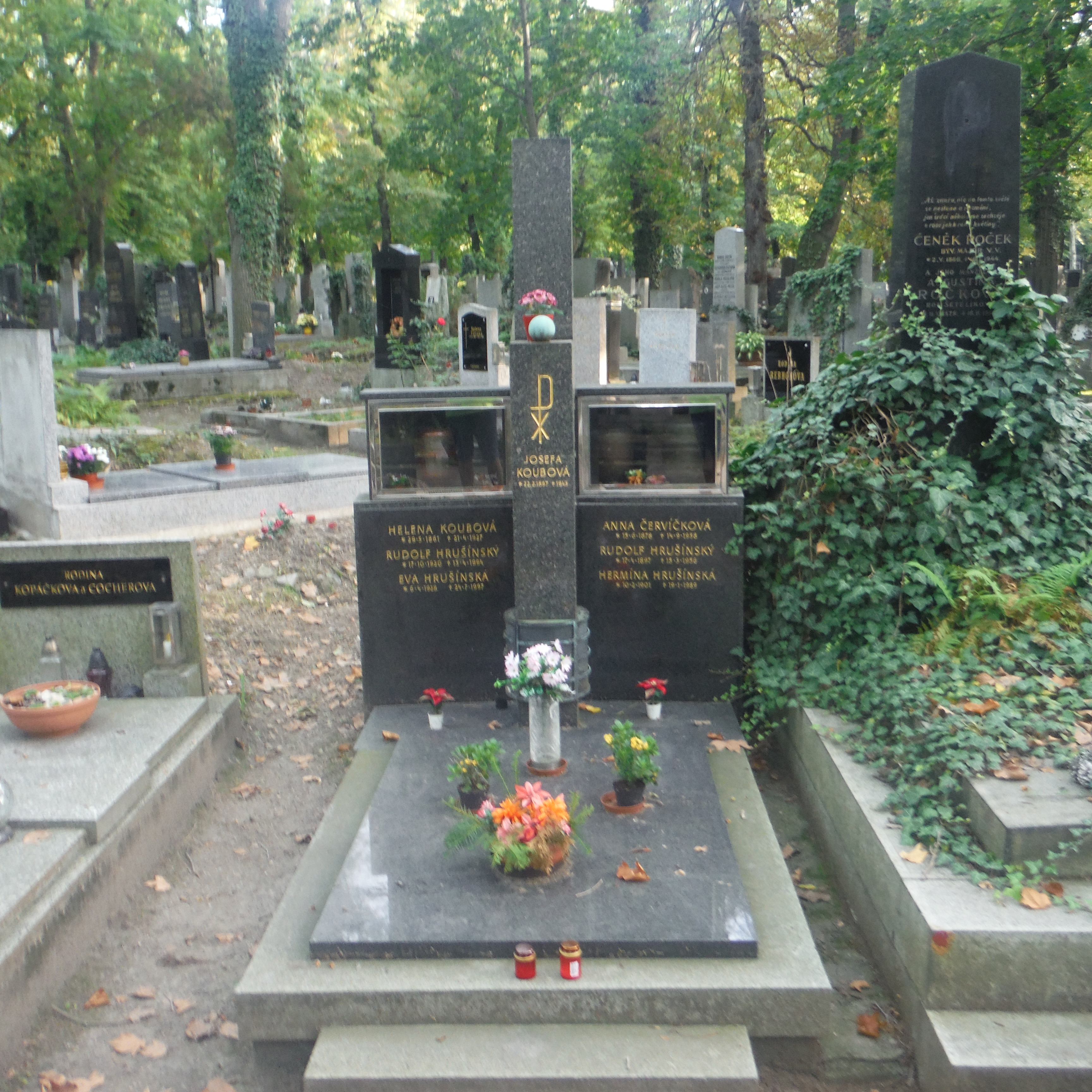 hrob